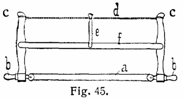 Gestellsäge mit durch Buchstaben gekennzeichneten Einzelteilen, ausgeschnitten aus der Datei L-Saege2, eingestellt von Kolossos am 5.November 2005